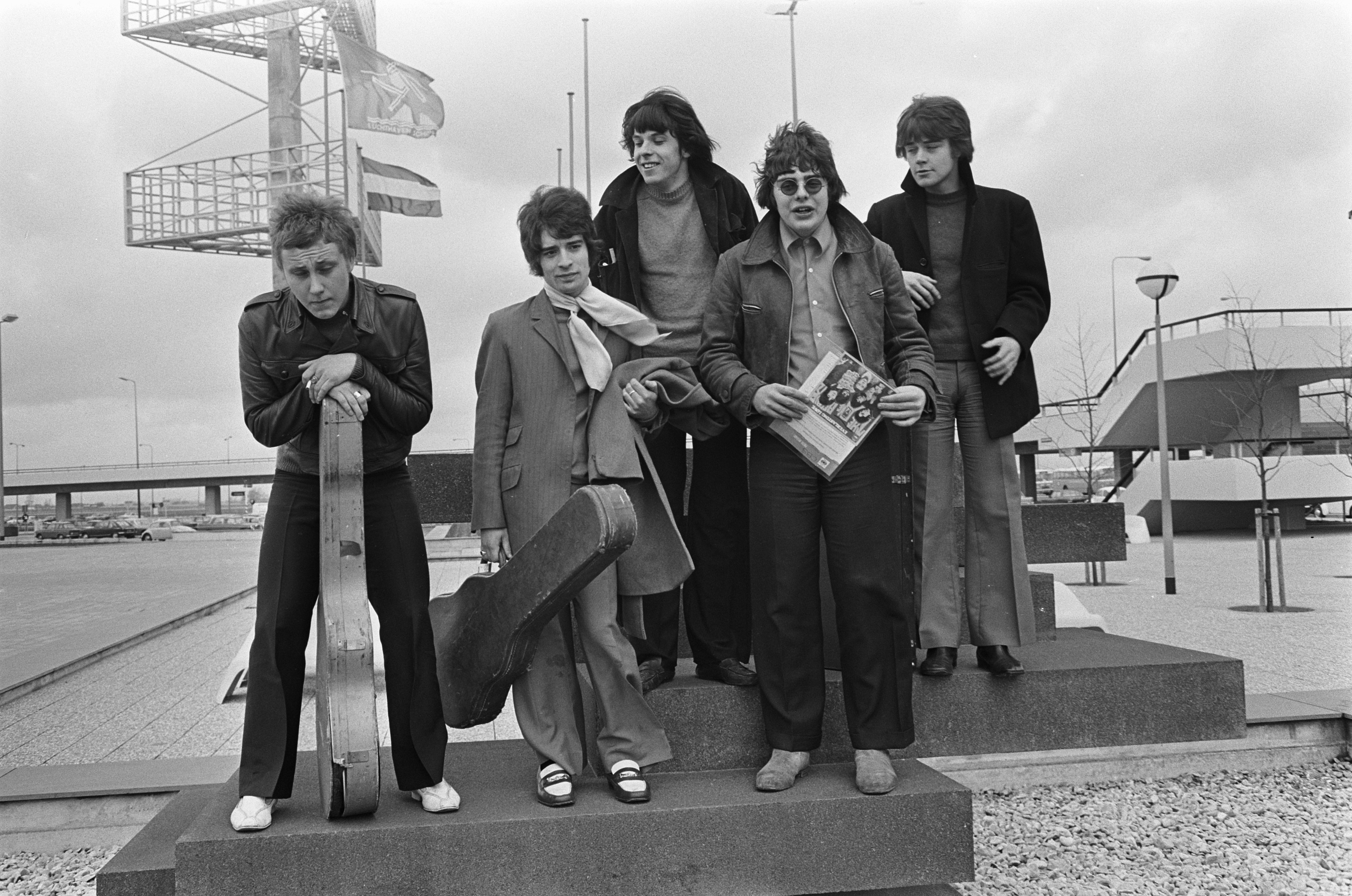 Collectie / Archief : Fotocollectie Anefo Reportage / Serie : [ onbekend ] Beschrijving : Aankomst Engelse beatgroep The Love Affair op Schiphol Annotatie : Ook genoemd: Love Affair Datum : 22 maart 1968 Locatie : Noord-Holland, Schiphol Trefwoorden : aankomst en vertrek, bands, popmuziek, vliegvelden Fotograaf : Koch, Eric / Anefo Auteursrechthebbende : Nationaal Archief Materiaalsoort : Negatief (zwart/wit) Nummer archiefinventaris : bekijk toegang 2.24.01.05 Bestanddeelnummer : 921-1872 Reacties Geplaatst door Musiclady op 18 maart 2015 - 21:06. Leden: Rex Brayley; Maurice Bacon; Mick Jackson; Steve Ellis; Morgan Fisher